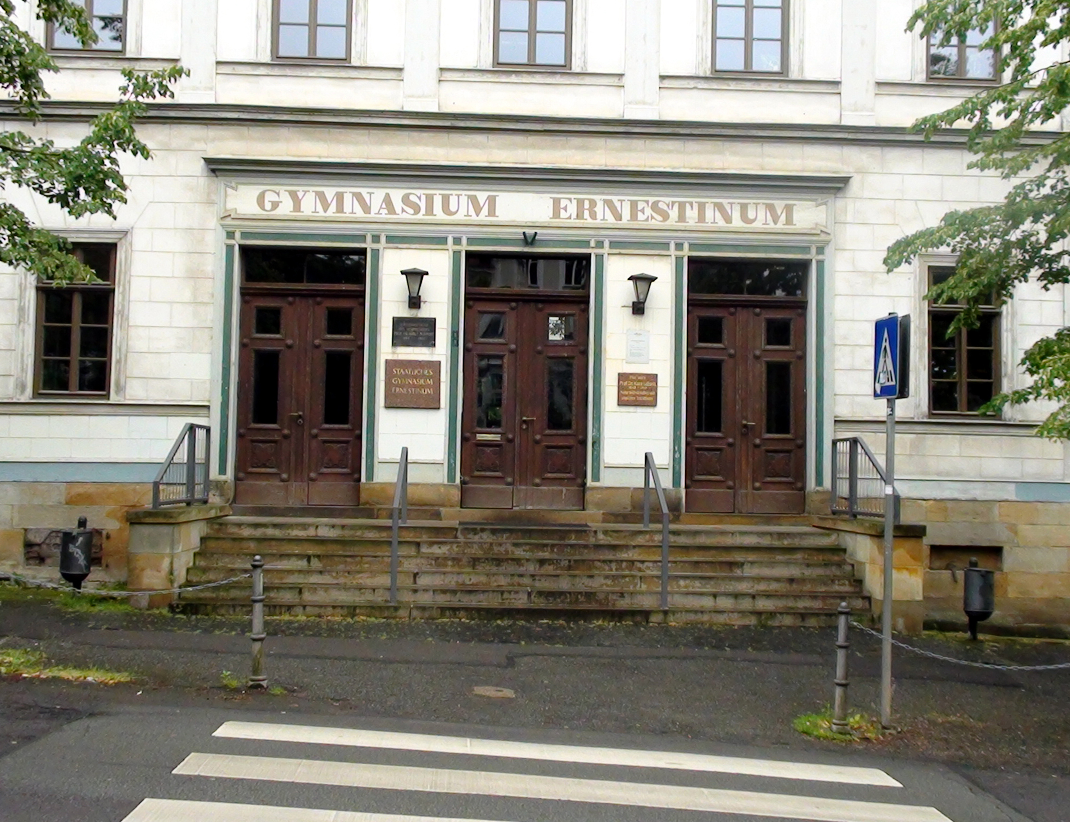 Am Eingang zum Gymnasium Ernestinum in Gotha, das 1859 durch Zusammenlegung zweier Vorgängerschulen entstand und nach über 40-jähriger Schließung seit 1991 wieder besteht, wird durch Gedenktafeln an zwei berühmte Lehrer erinnert, an den Geophysiker Adolf Schmidt (1860-1944) und den Naturwissenschaftler und Science-Fiction-Autor Kurd Laßwitz (1848-1910).